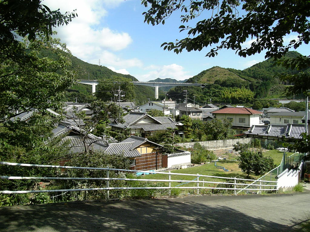 土丸地区の風景（大阪府泉佐野市）